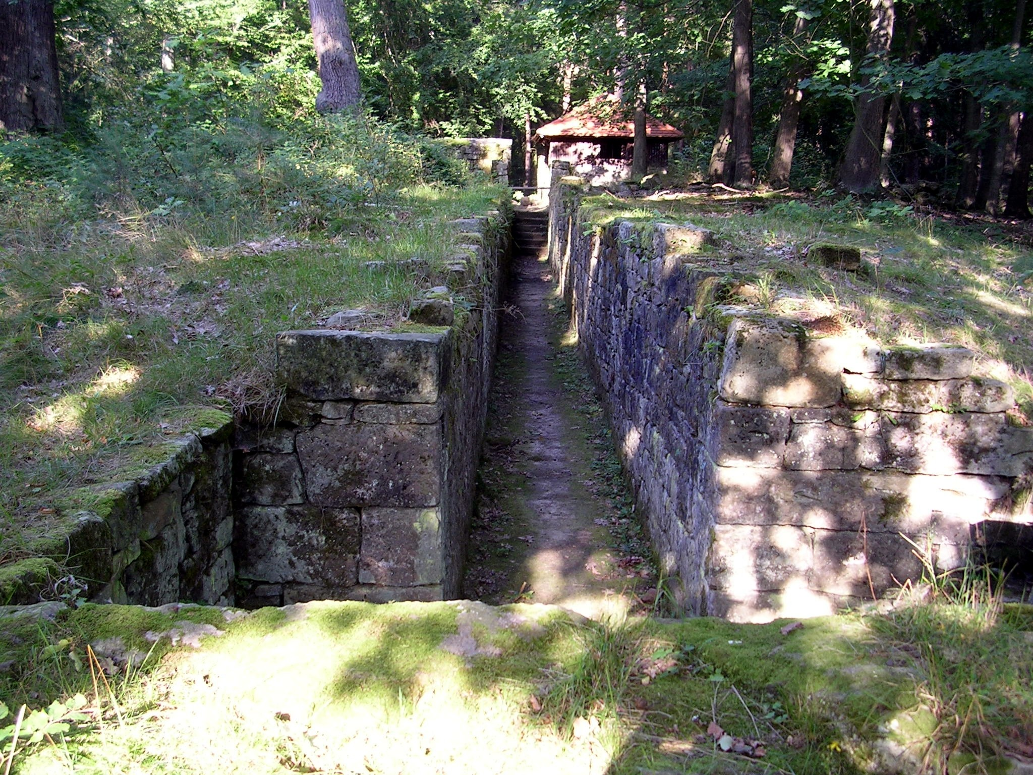 Hummelshain, Jagdanalage Rieseneck